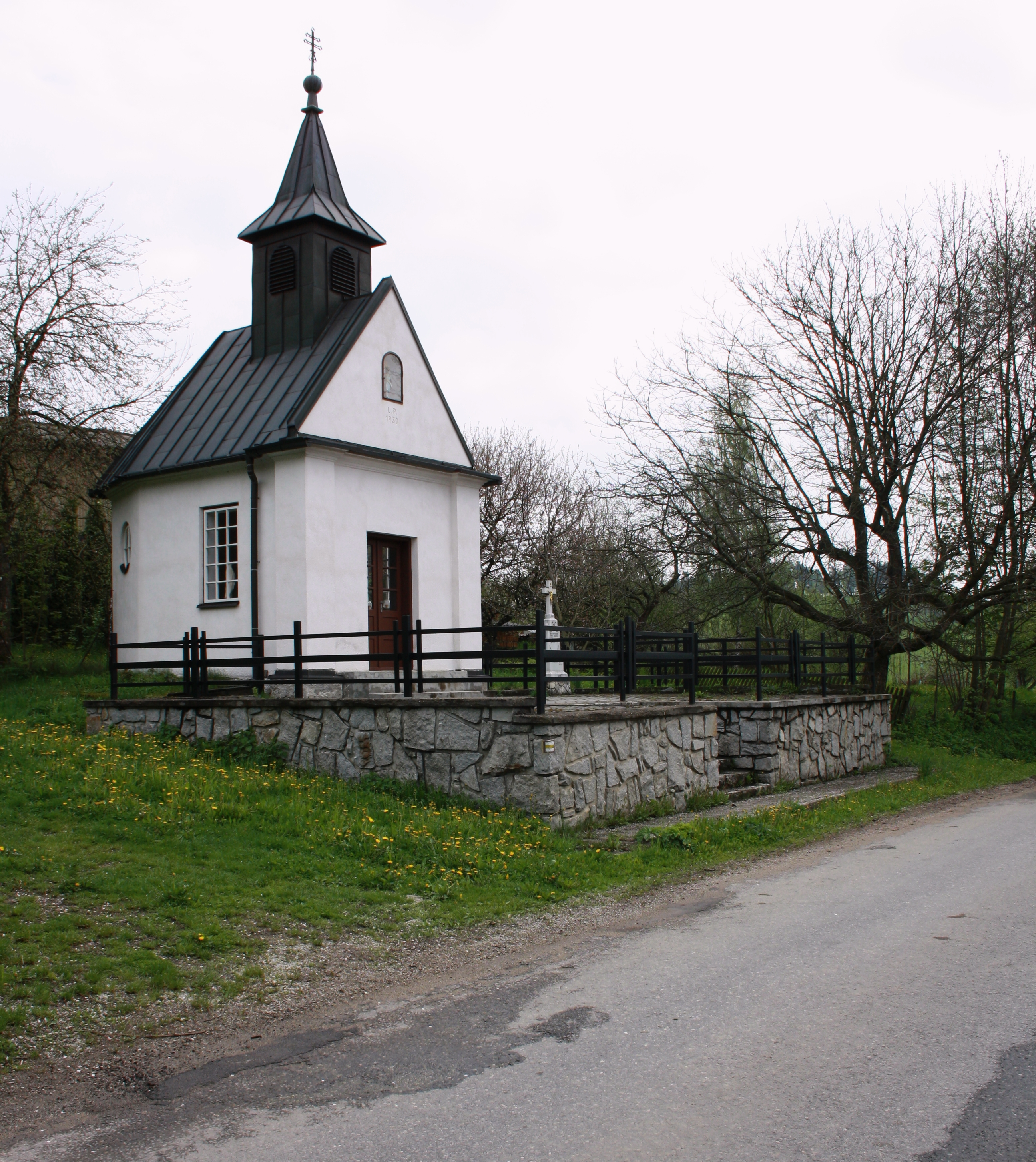 Meziboří (Strážek) - kaple svatého Cyrila a Metoděje This photograph was taken within the scope of the 'Czech Municipalities Photographs' grant. This photograph was taken with a DSLR from WMCZ's Camera grant.